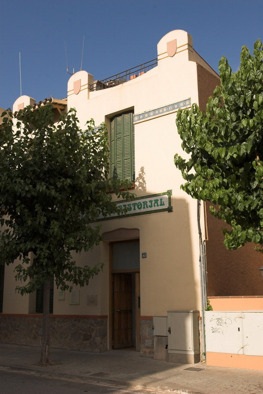 Ajuntament. Casa Espelta (el Figaró-Vallès Oriental-Catalunya), obra de Manuel Raspall 1921